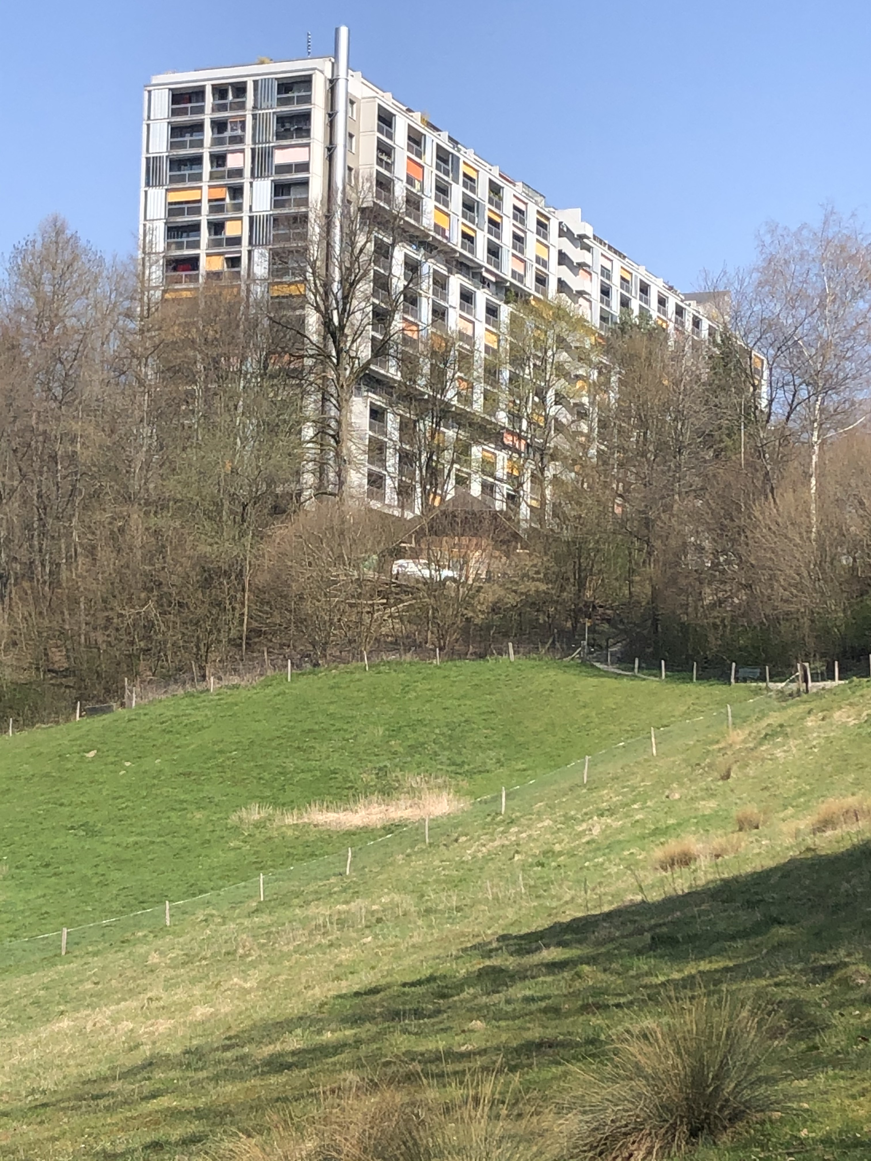 Gäbelbach Hochhausblick von Westen